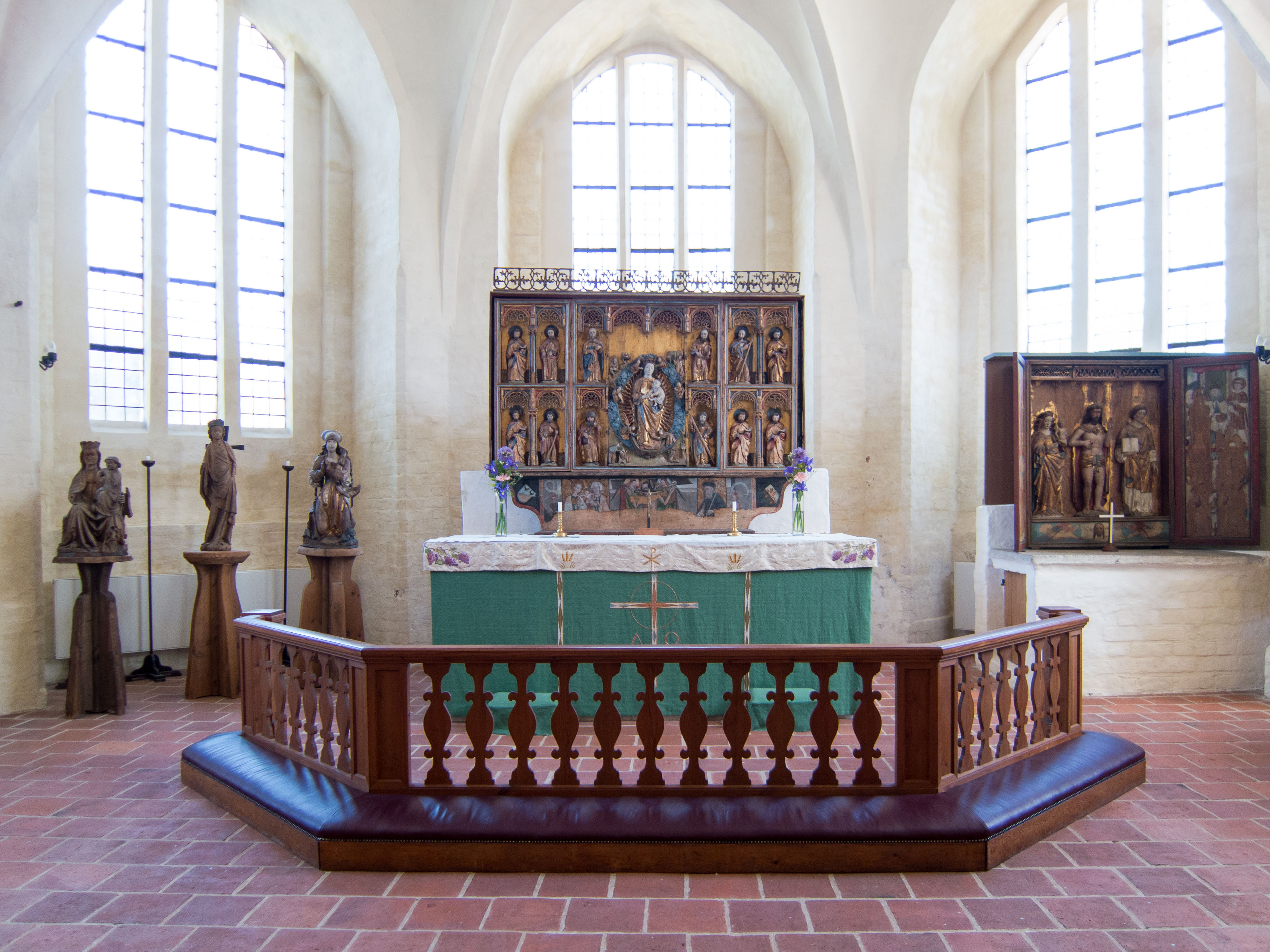 Falsterbo kyrka (Falsterbo 2:25)